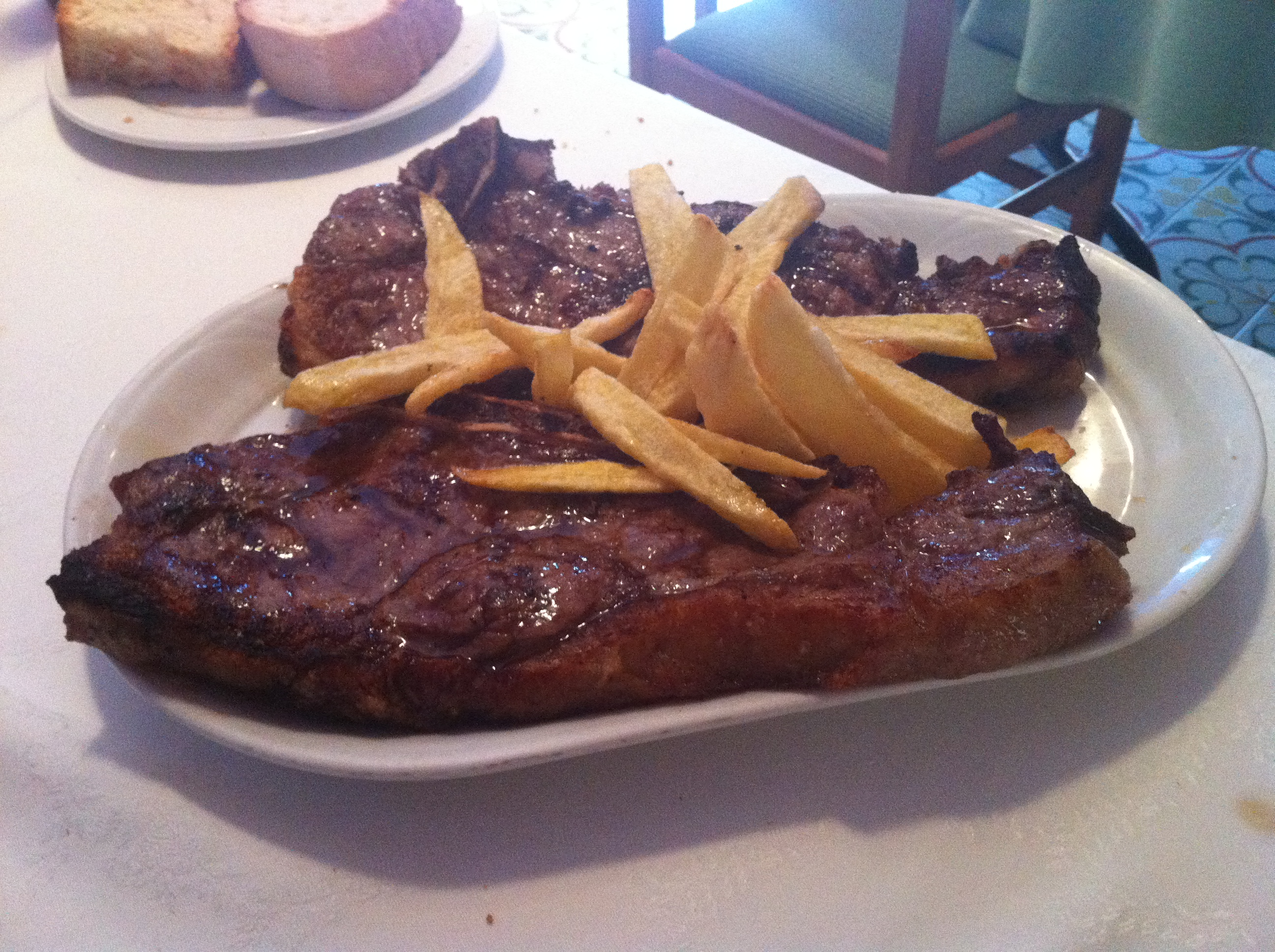 Filete de ternera alistana - Zamora